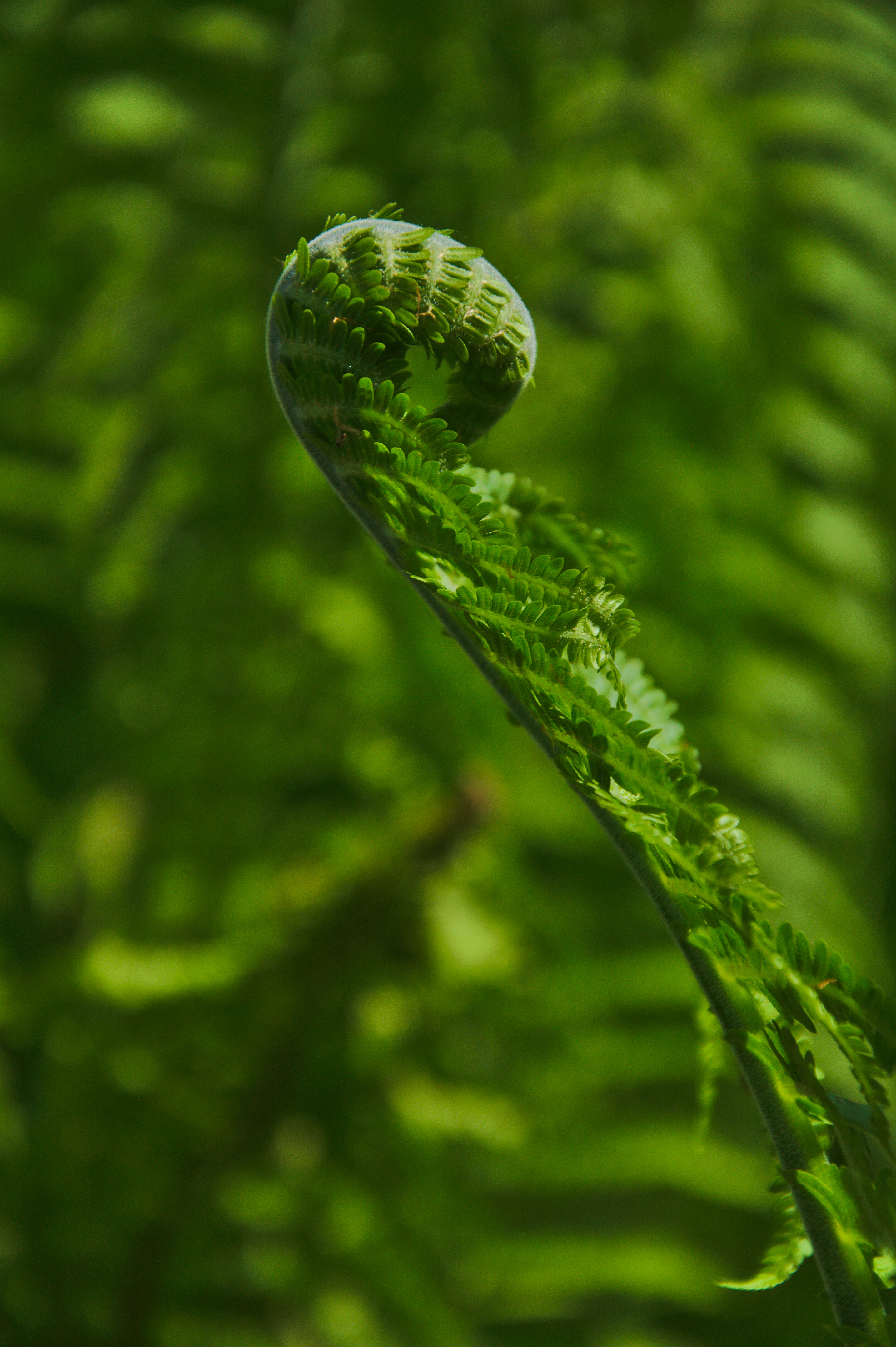 Přírodní památka Svratka, okres Žďár nad Sázavou